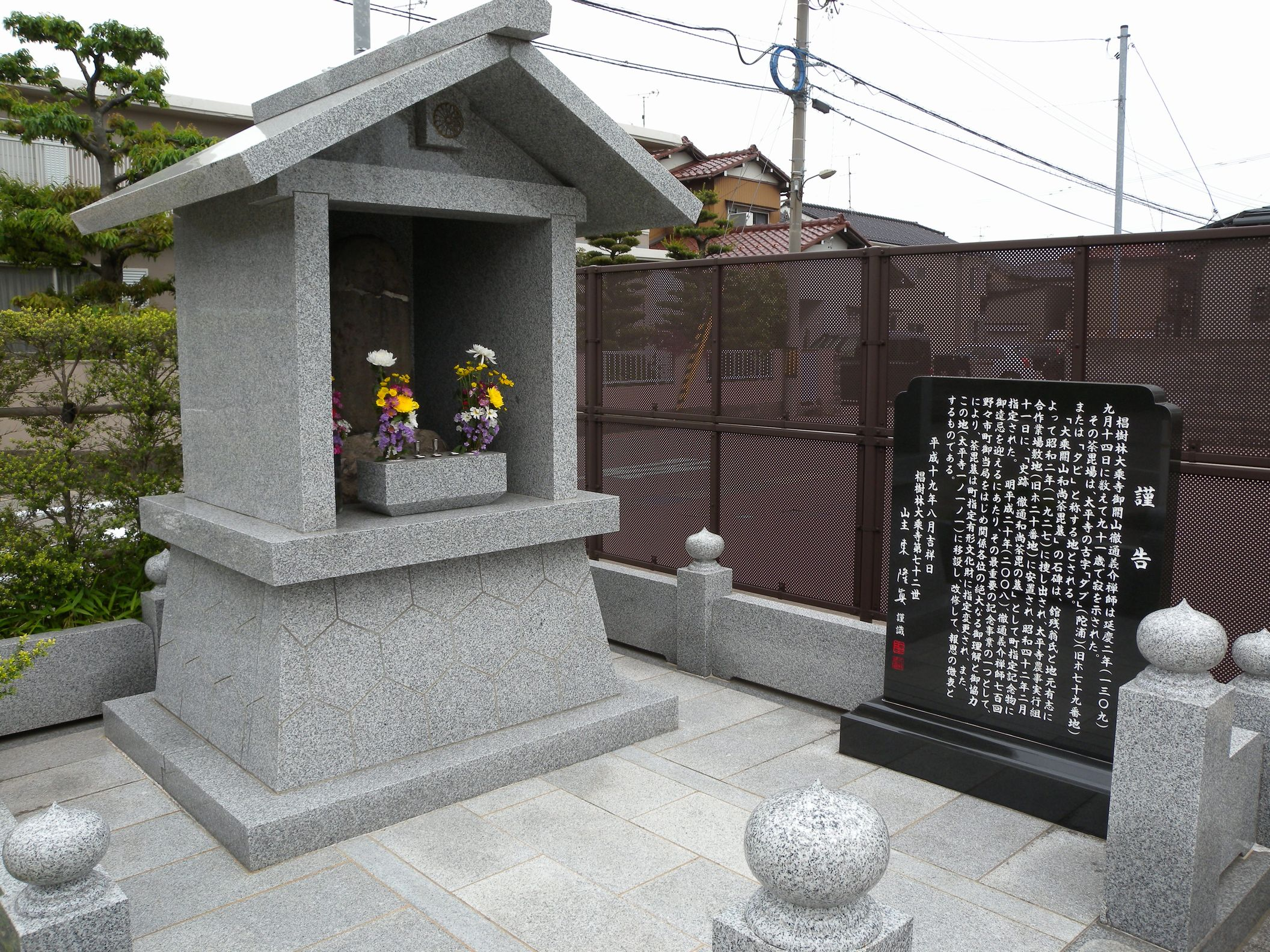 残翁らが発掘して探し出した徹通義介和尚荼毘塚の墓標